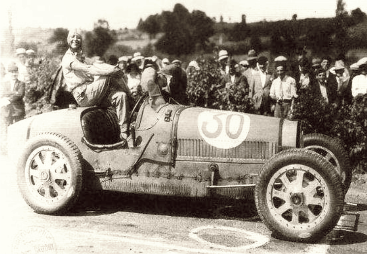 A piloto Hellé Nice posa após corrida no circuito de Comminges (Bugatti n°30), Francia, 16-08-1931.